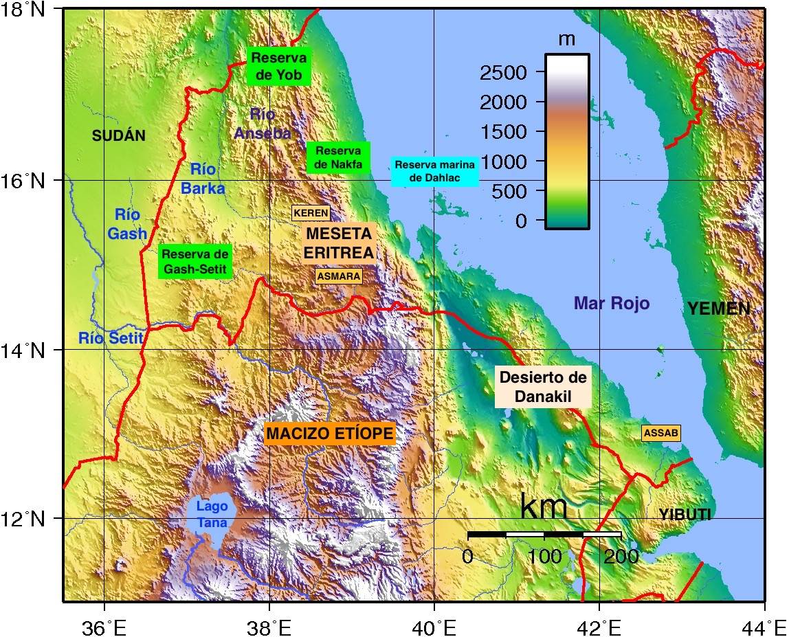 Mapa de Eritrea con reservas naturales, ríos y lugares geográficos relevantes